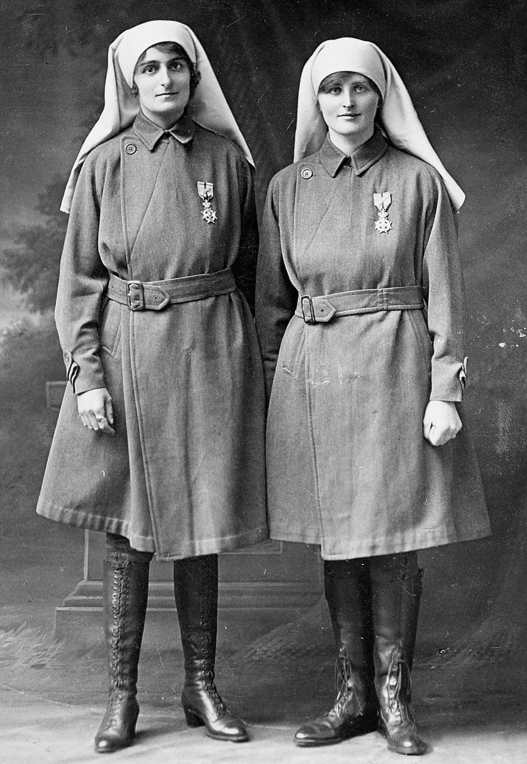 E&M